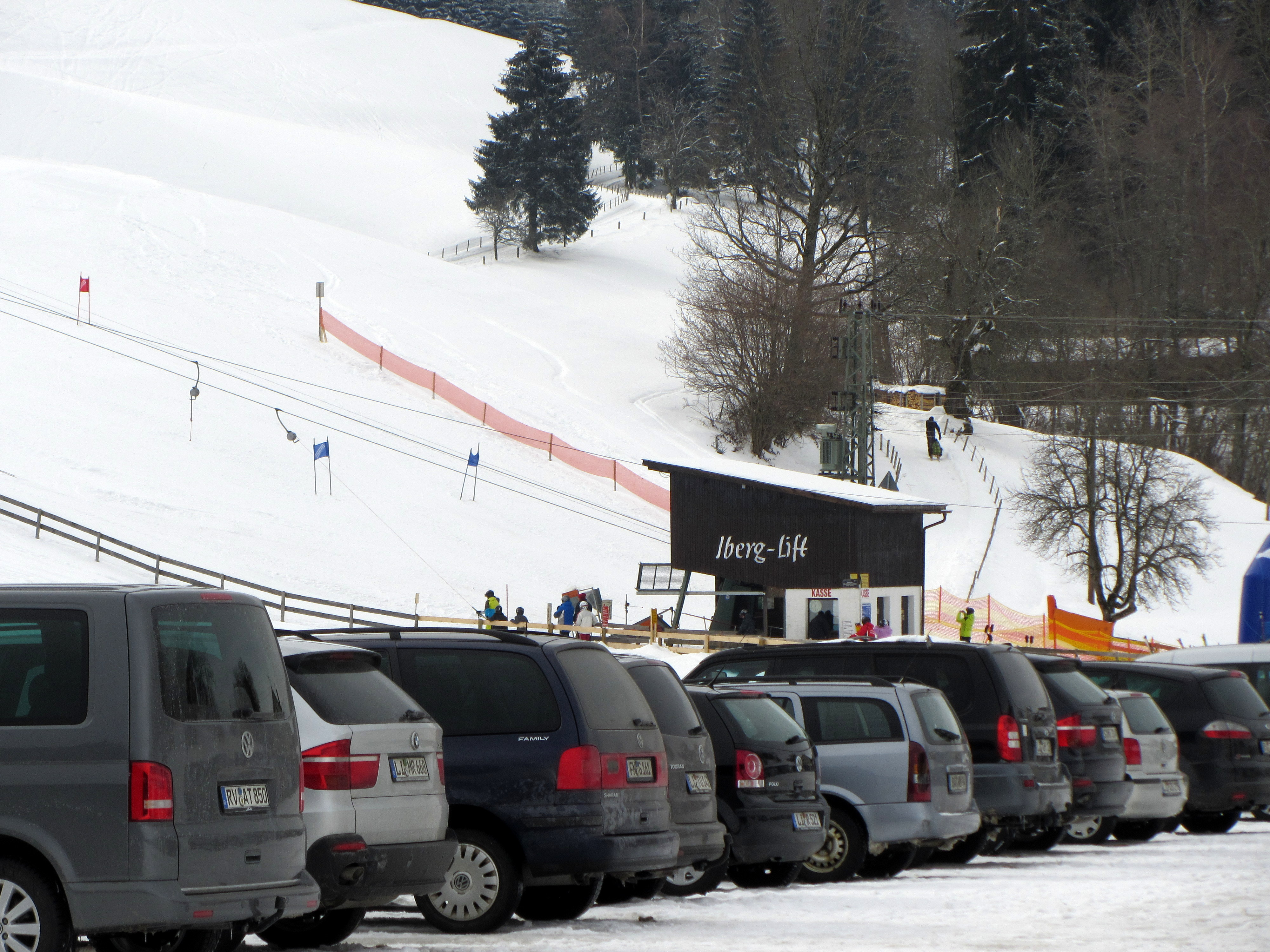 Skilift I-Berg